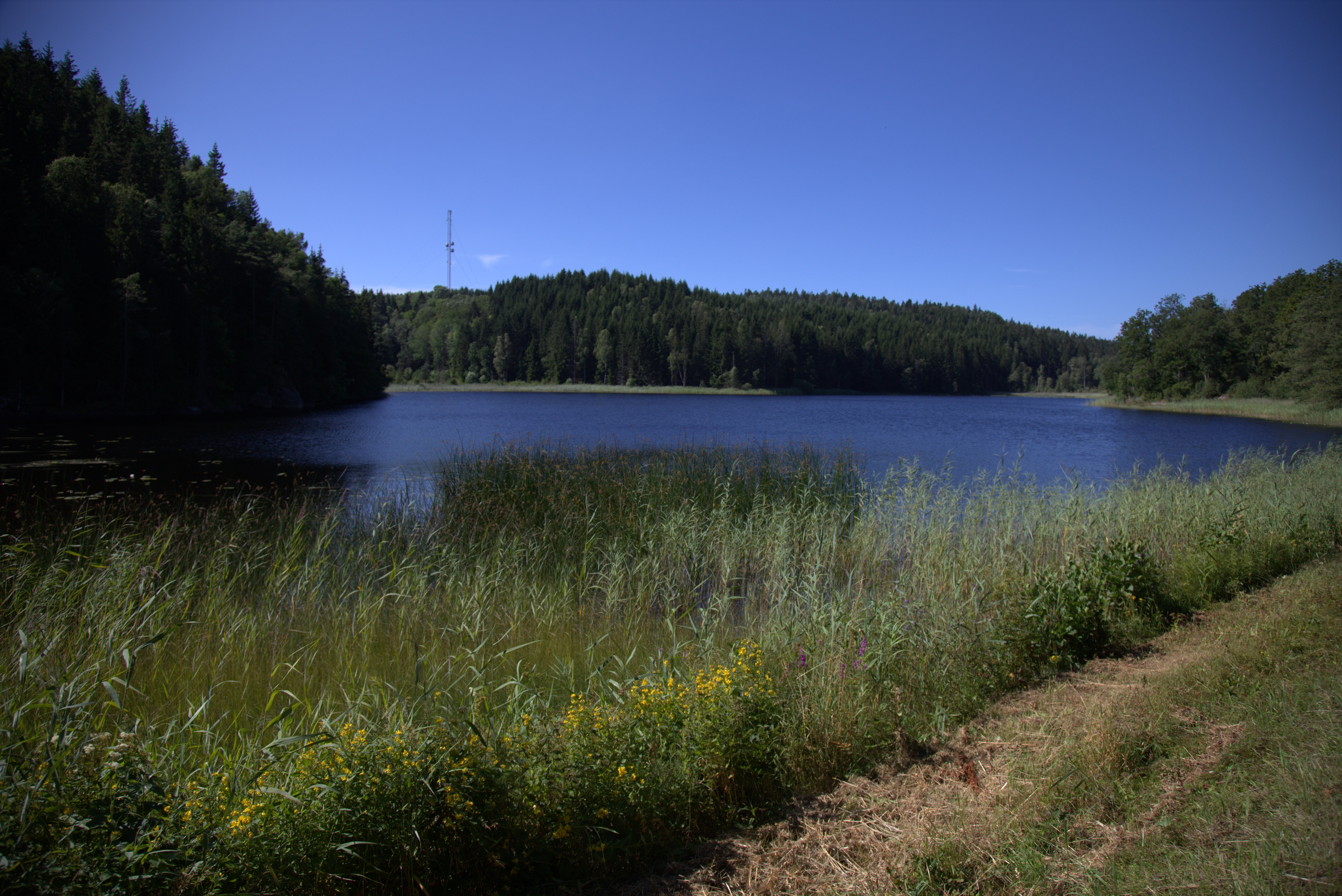 Lillevatten i Stenungsunds kommun.